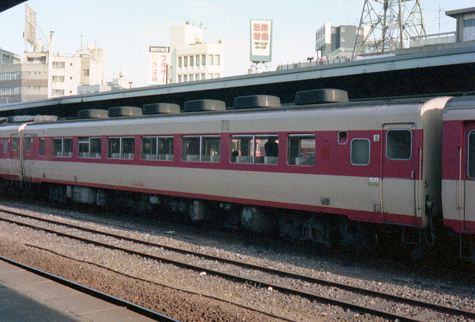 国鉄 キハ28 5010